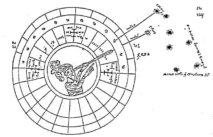 Utilisation d'un nocturlabe selon un ms. du XIIe siecle (Chartres)